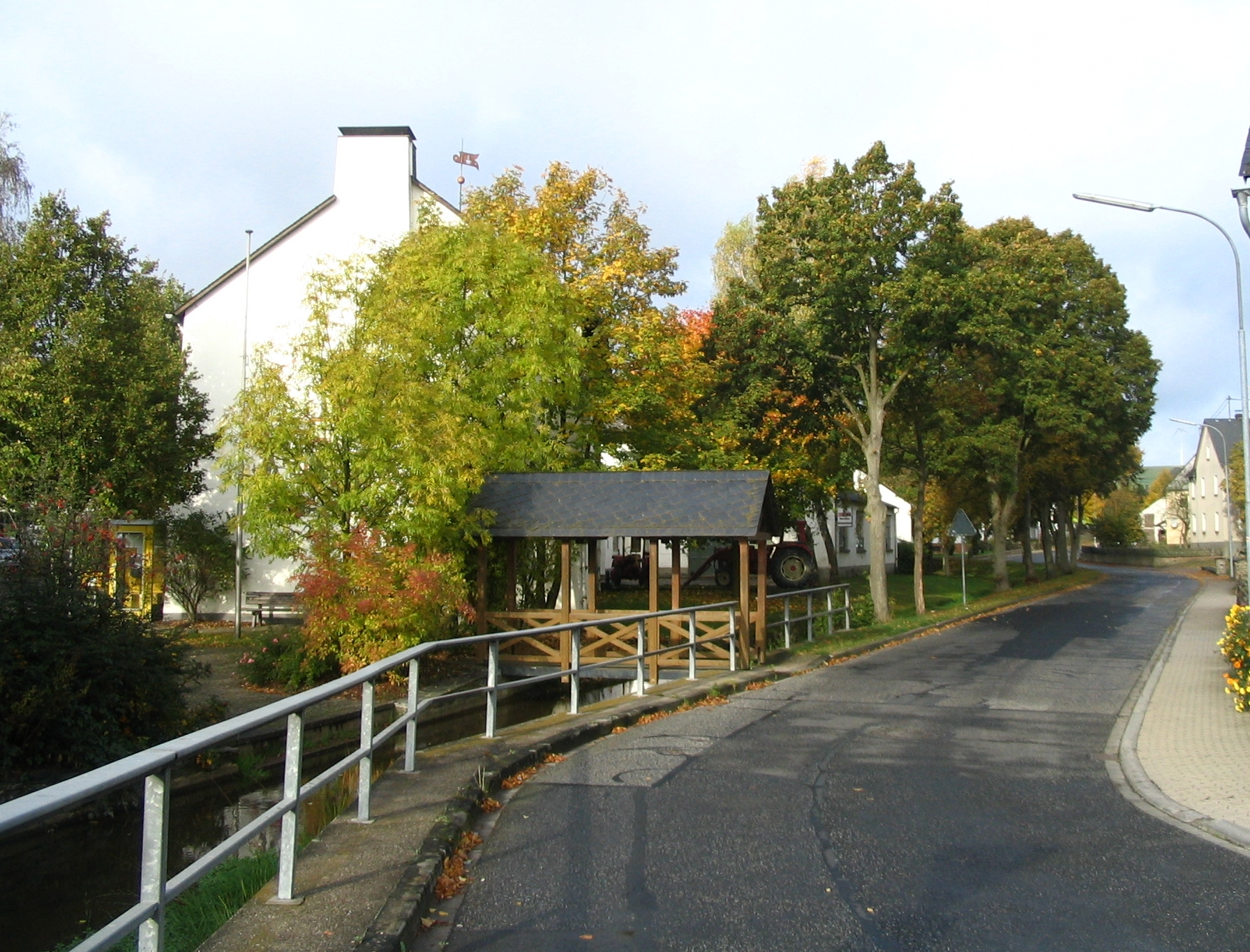 Dorfzentrum mit Gemeindehaus